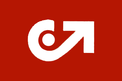 Bandera de la Unión de Centro Centro